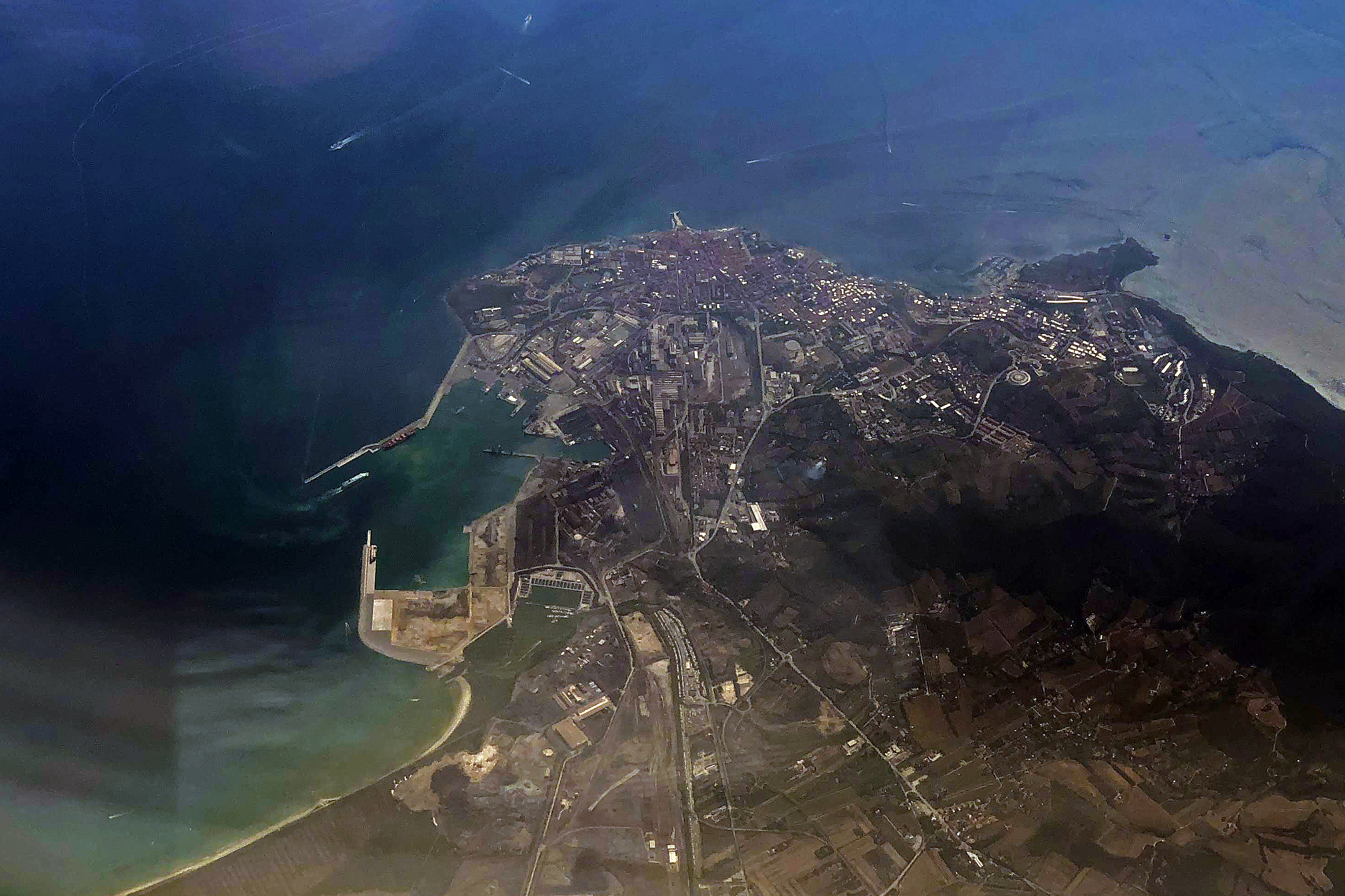 Vista aerea di Piombino, agosto 2018